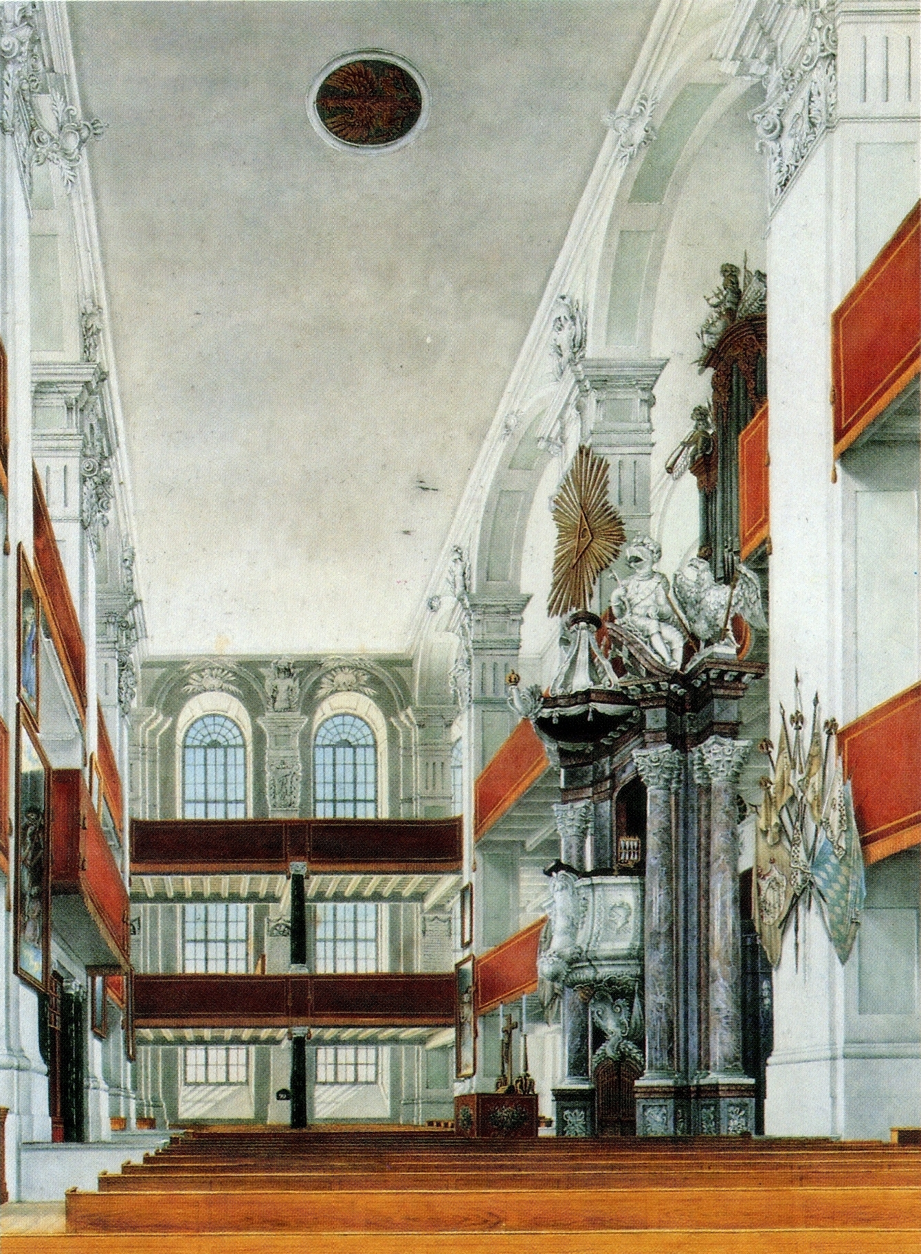 Der Innenraum der Garnisonkirche gesehen nach Osten